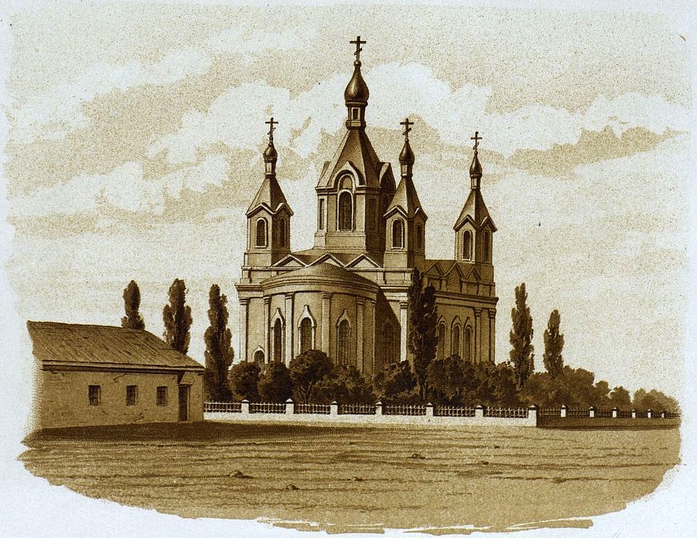 Беларуская (тарашкевіца): Берасьце (Bieraście), вуліца Саборная (vulica Sabornaja). Саборная Сімяонаўская царква-мураўёўка